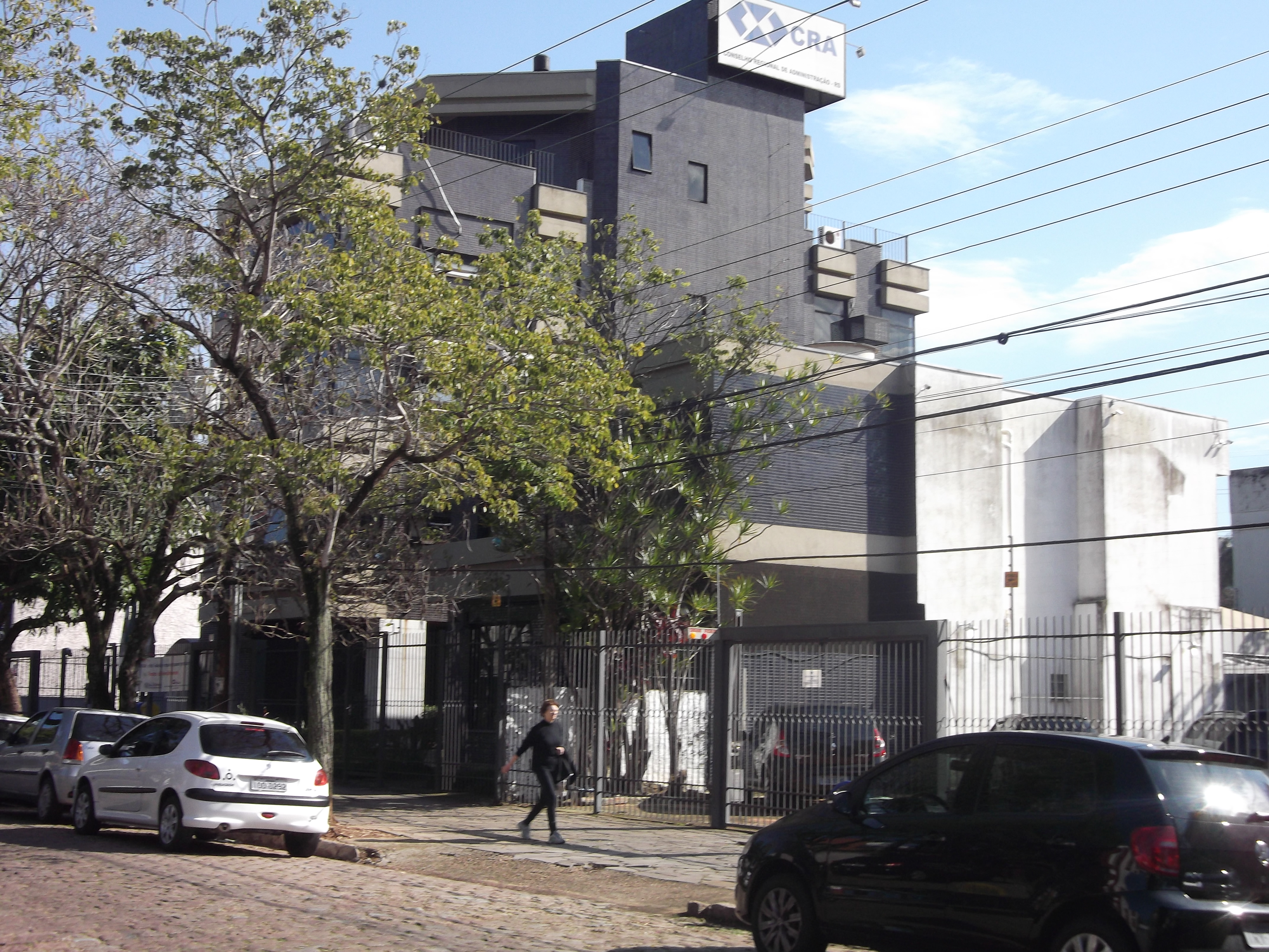 Conselho Regional de Administração do Rio Grande do Sul (CRA-RS). Rua Marcílio Dias n. 1030, Porto Alegre, Brasil